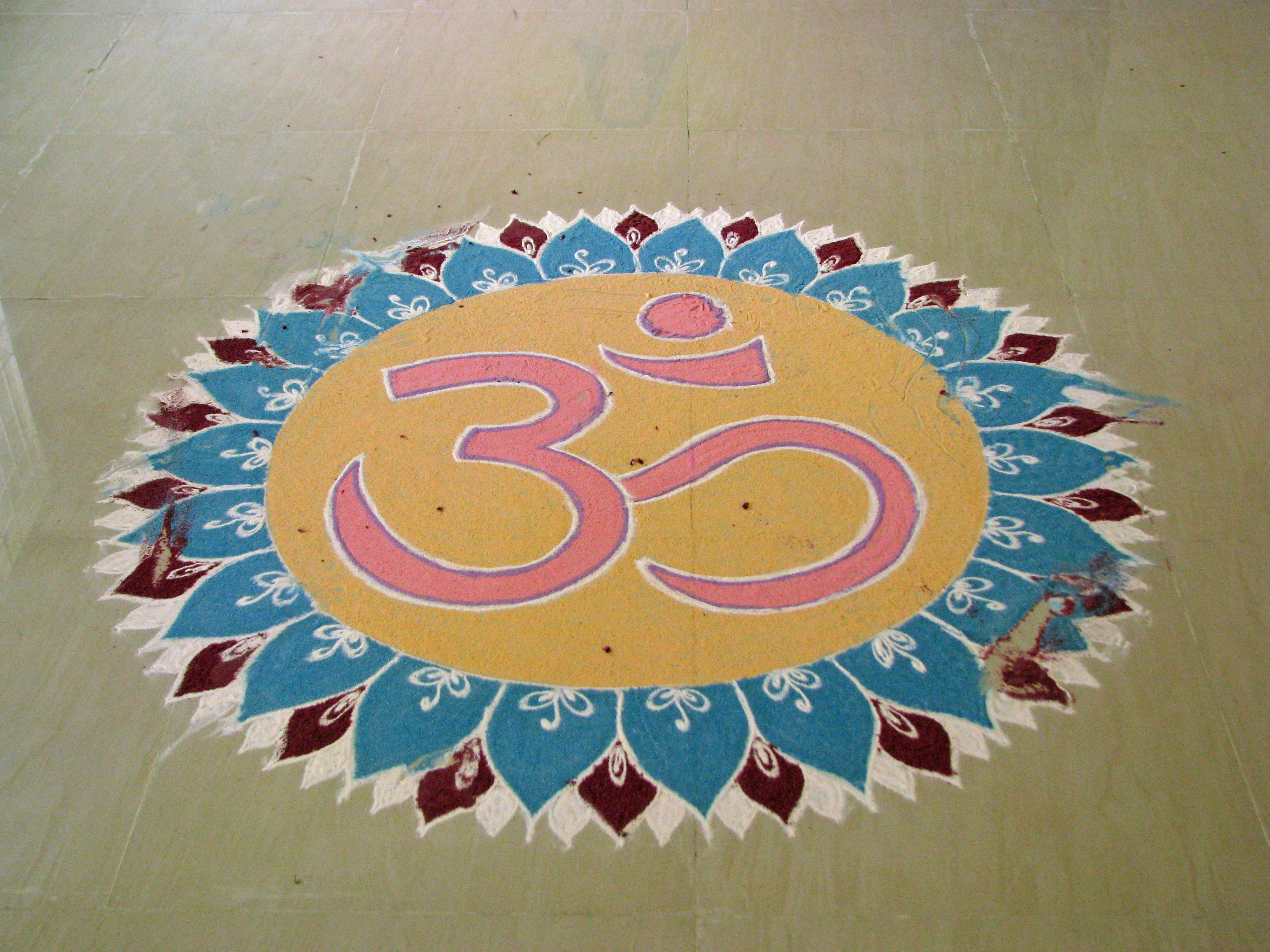 India - Kolam - 12